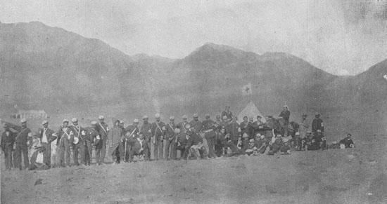 Fotografía del personal de sanidad militar del Ejército chileno, en el campamento de Antofagasta, 1879, durante la Guerra del Pacífico